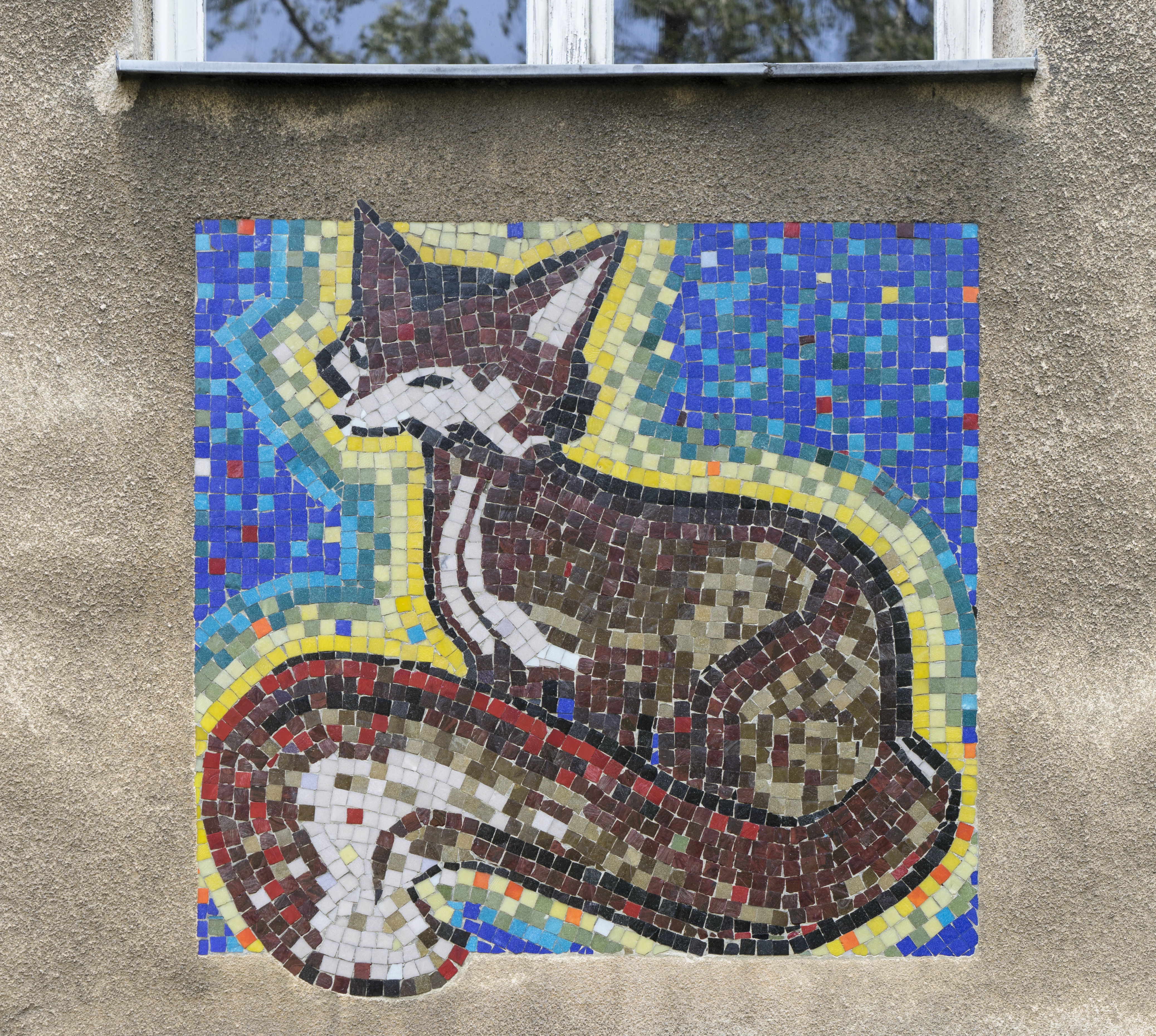 Wohnhausanlage Gablenzgasse 27